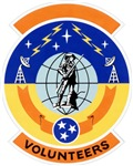 228 Combat Communications Squadron emblem